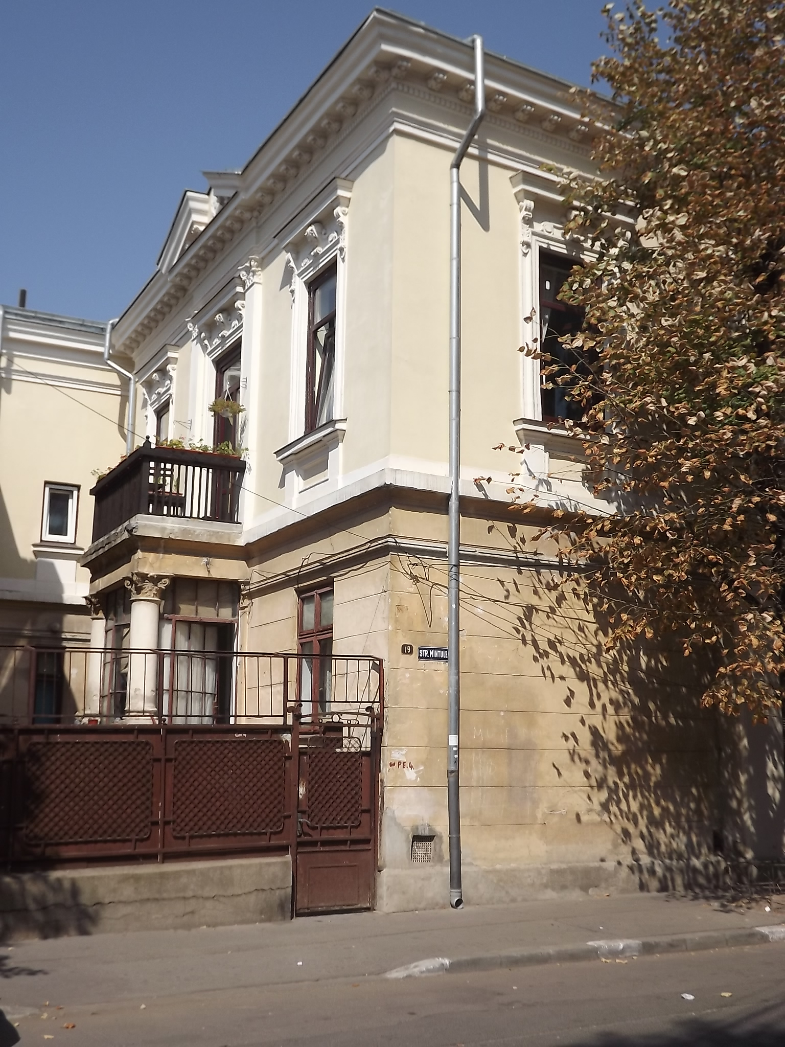 Casăgv